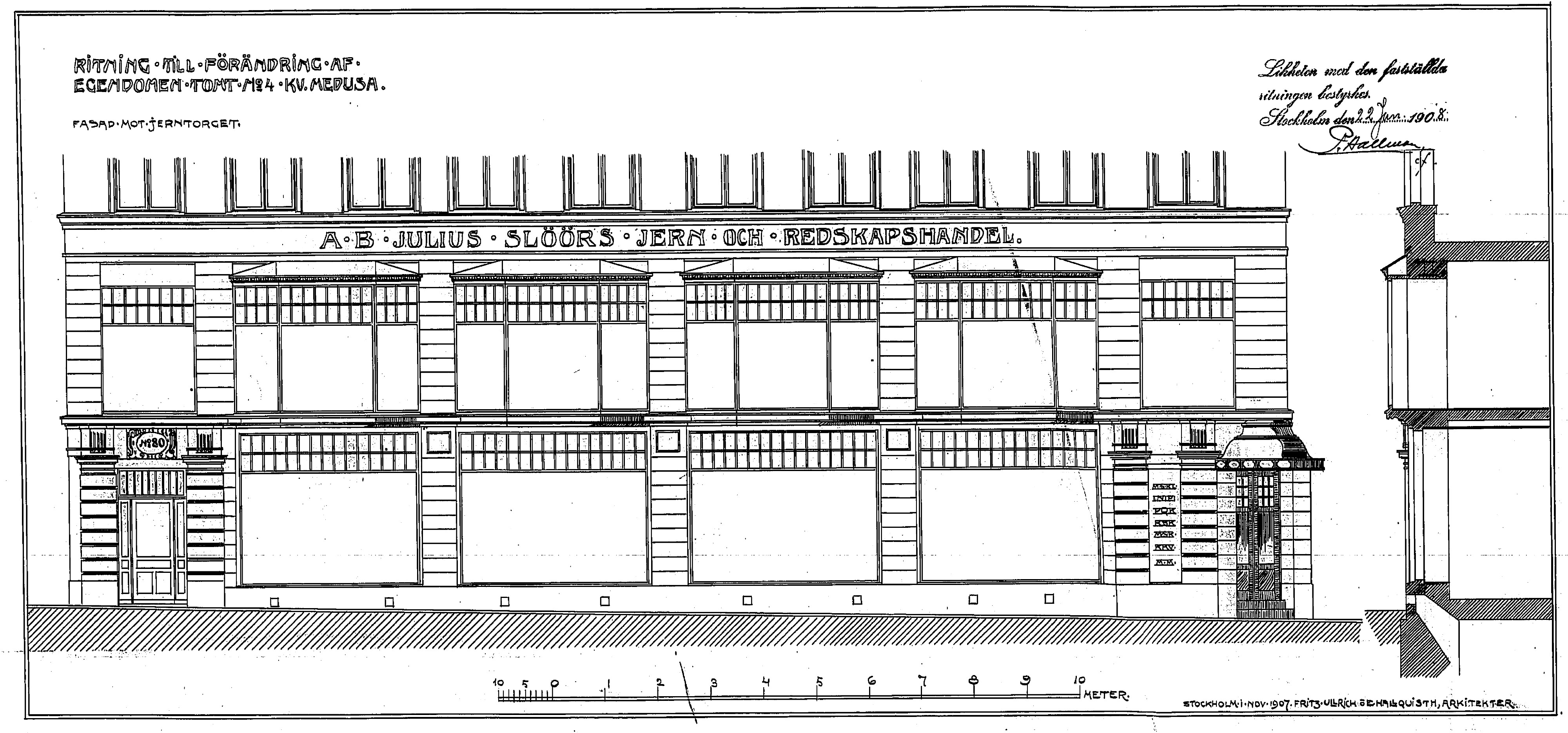 Fastigheten Medusa 4 vid Järntorget, ändringsritning av Ullrich & Hallquisth